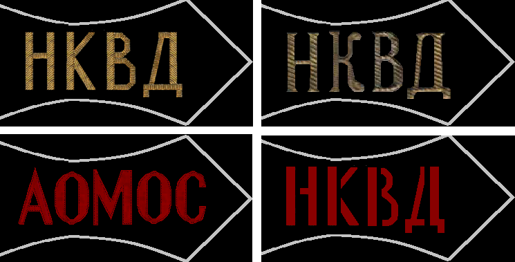 АХО милиции 1924